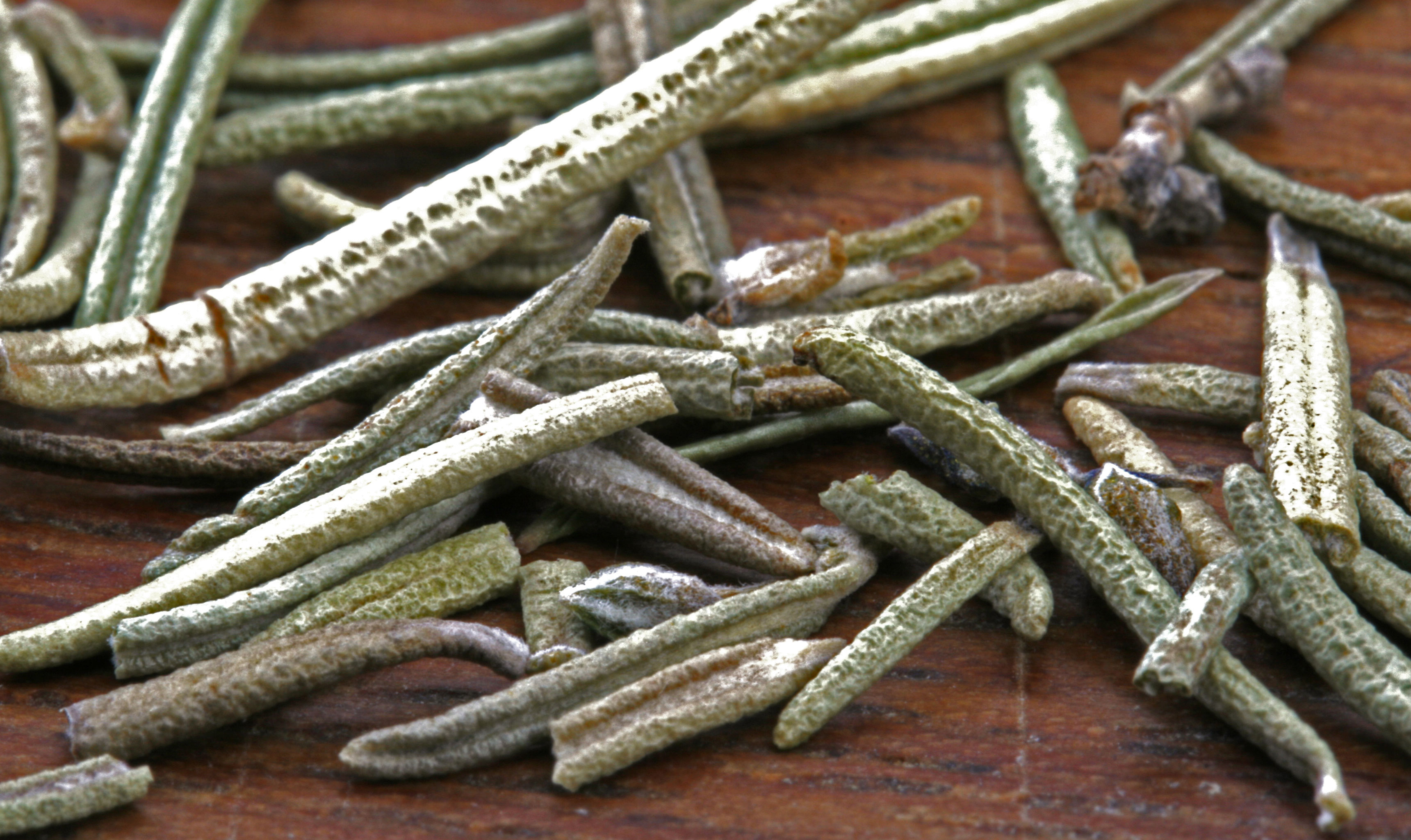 Rousemaräin als Gewierz.